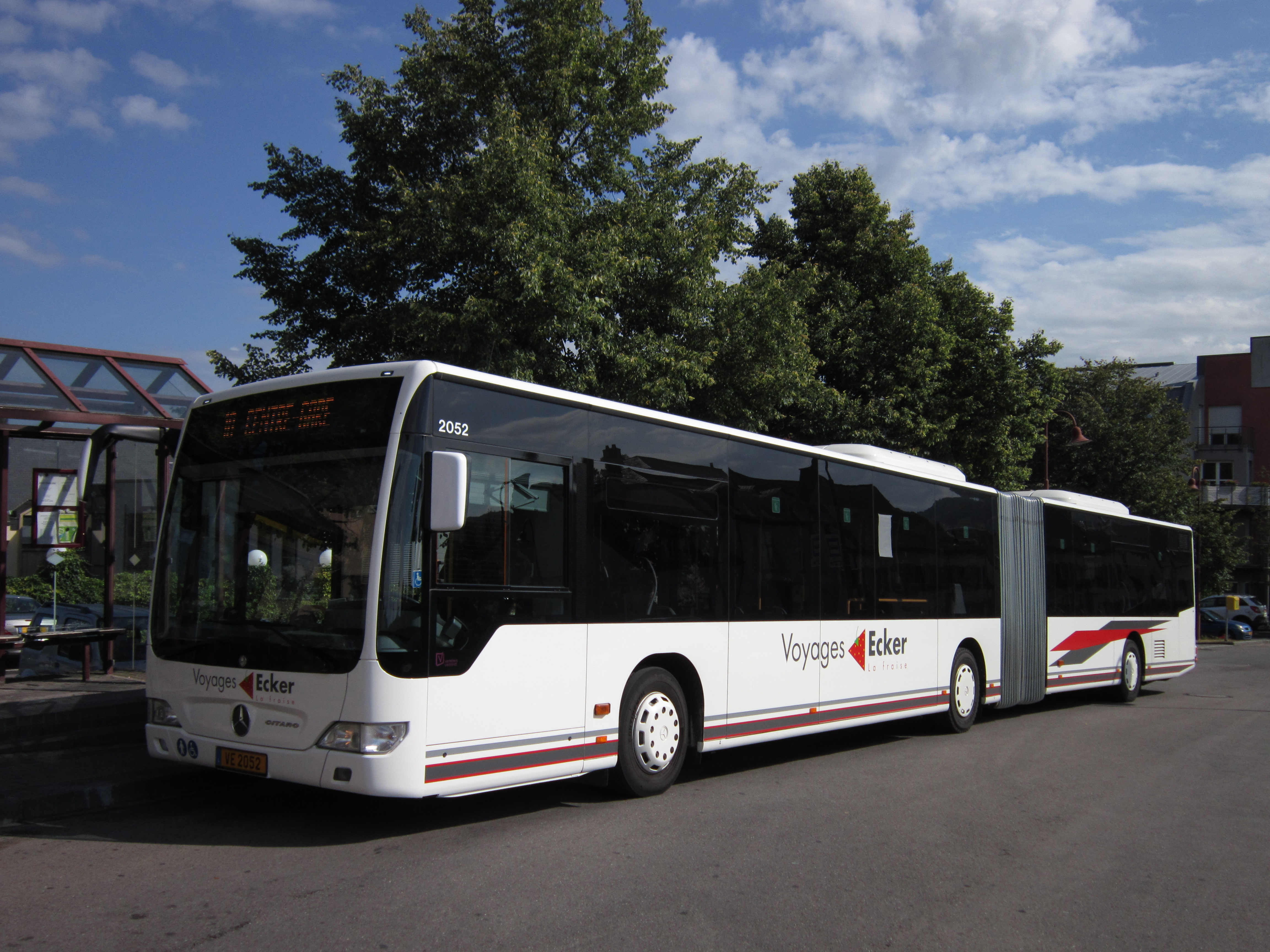 Autobus articulé appartenant à un sous-traitant des Autobus de la Ville de Luxembourg.